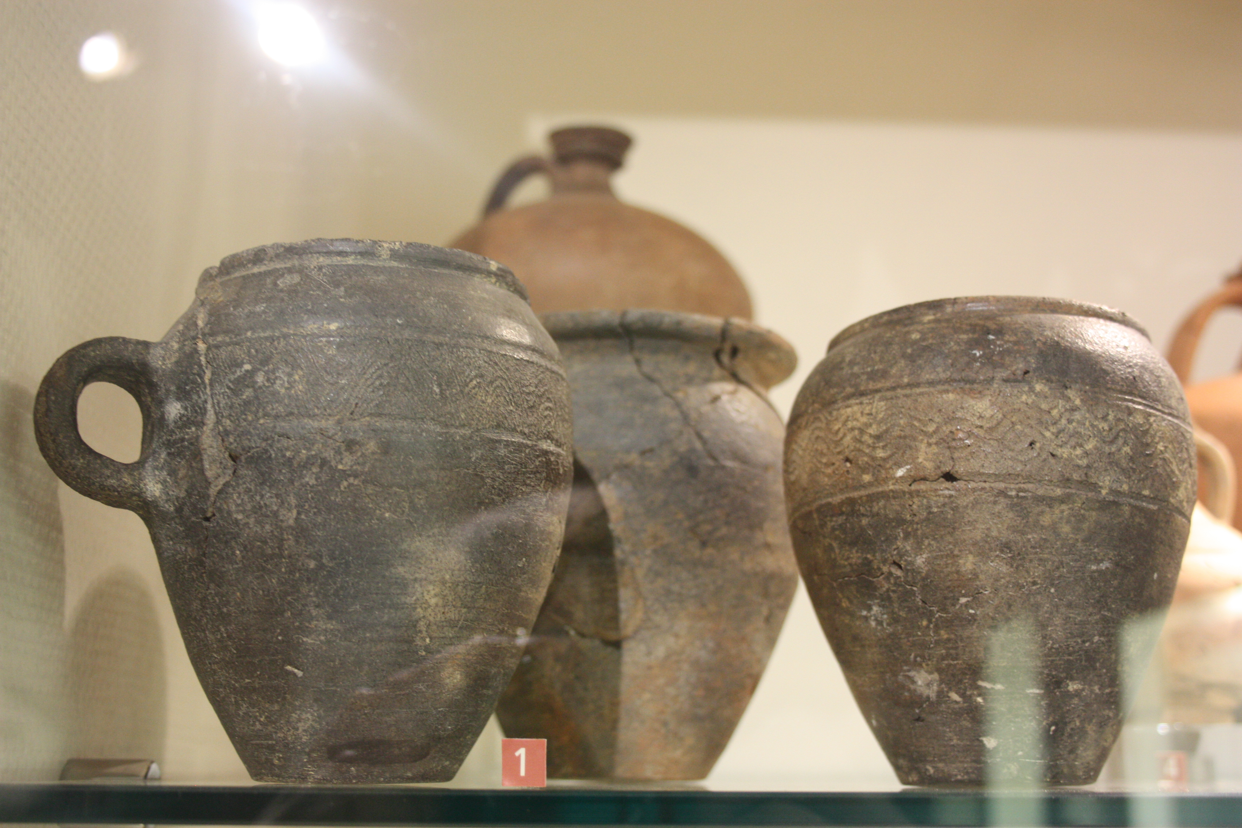 céramiques d'importation découvertes à Frénouville